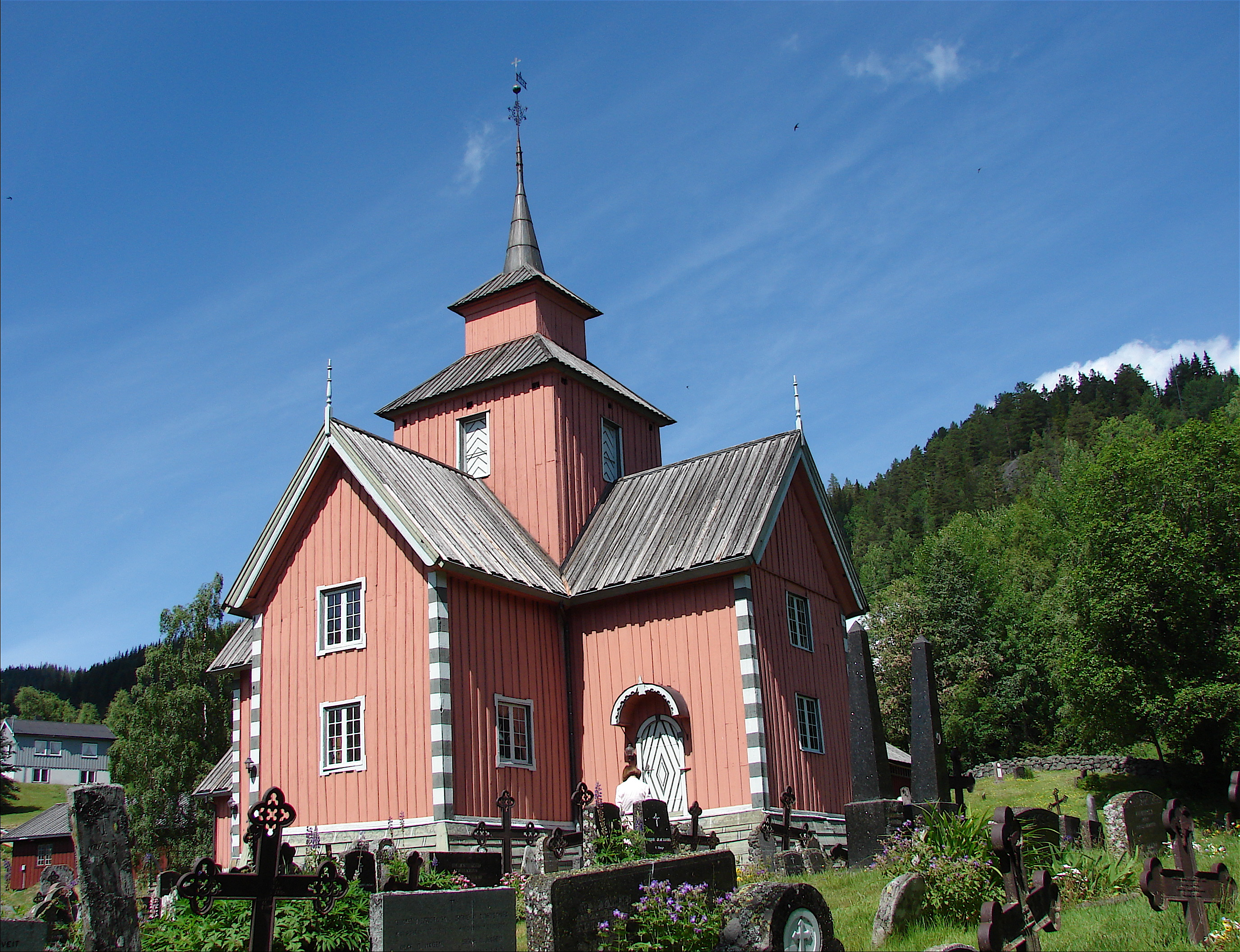 Eglise de Vinje